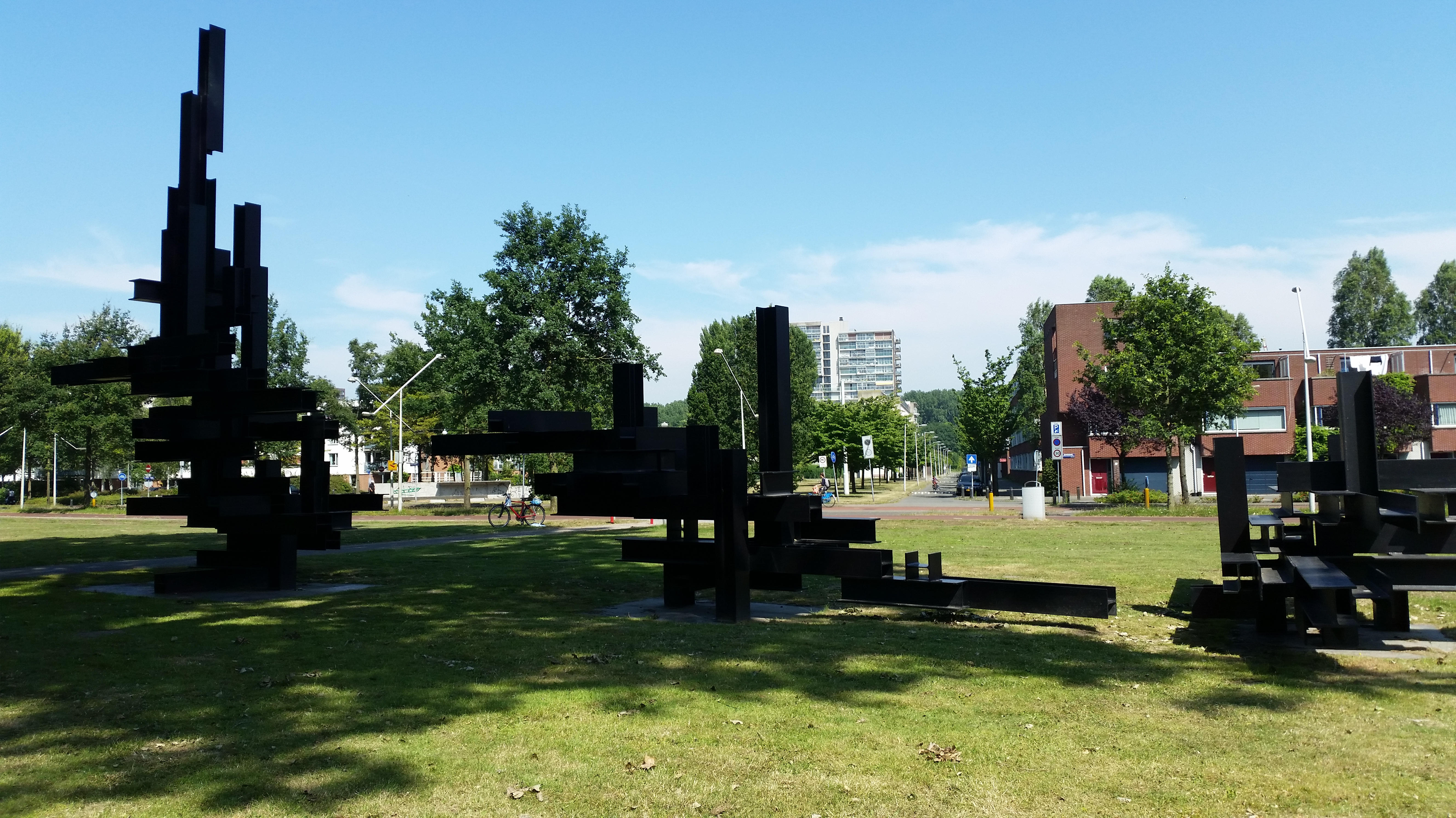 Constructie H-Balk DIN 30 Sloterpark; naar de weg toe gezien